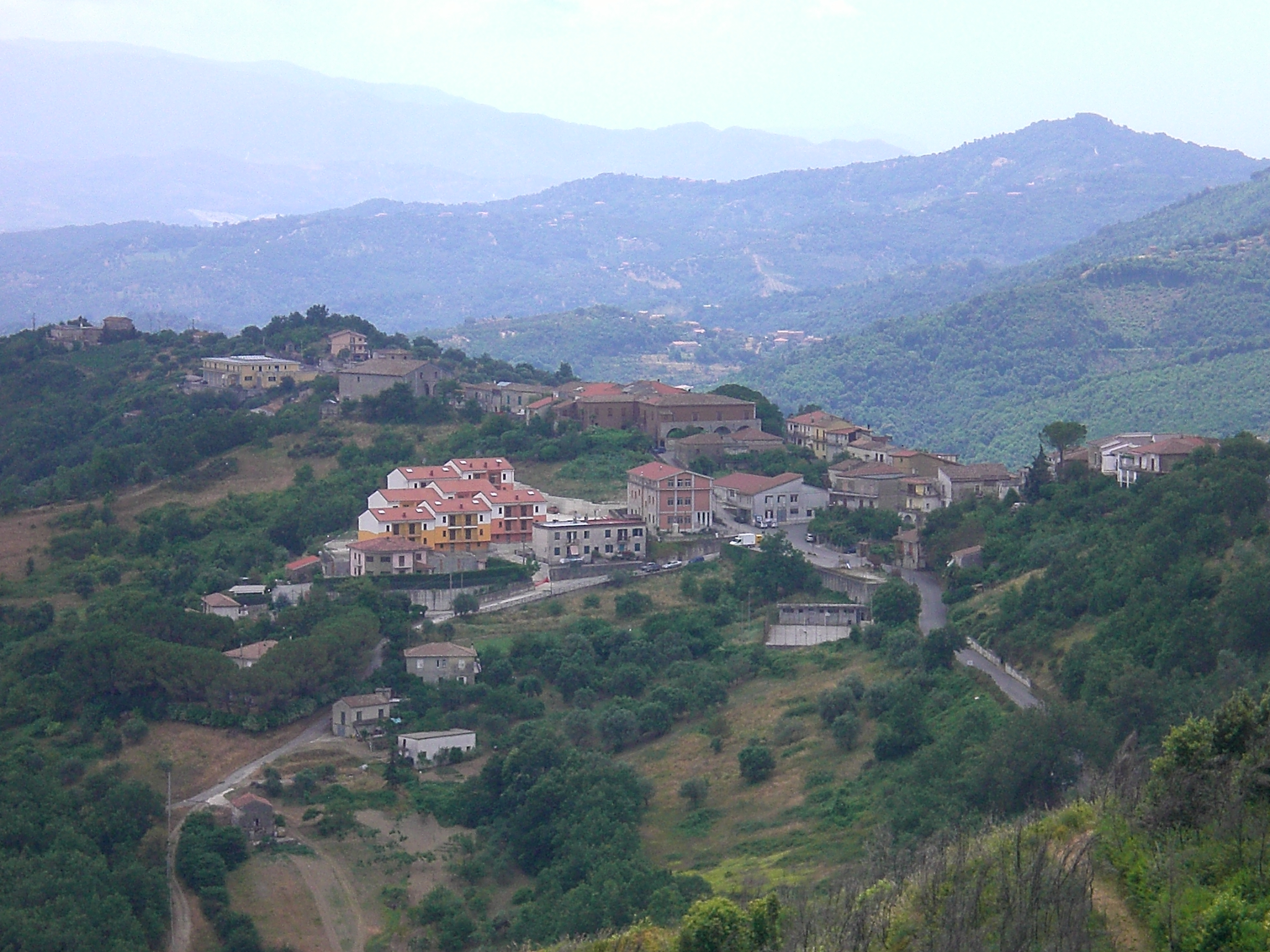 Panorama di Lustra